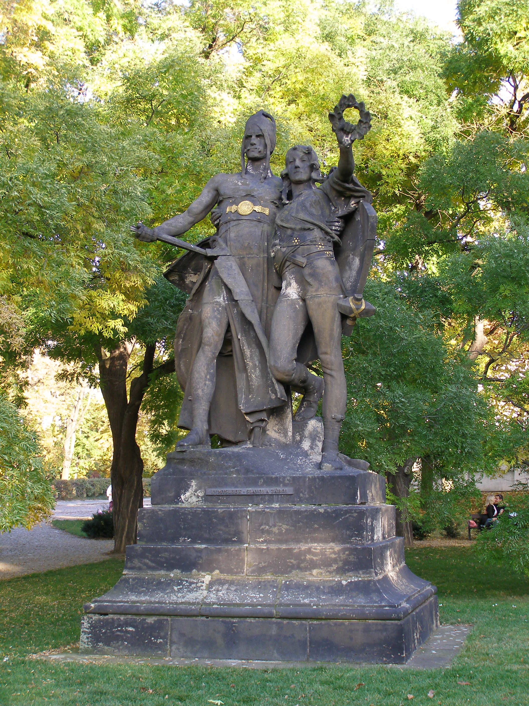 Pevnost Vyšehrad, Praha 2-Vyšehrad, Soběslavova 14/1, V pevnosti 16/2, 35/11, K rotundě 16/3, 81/6, 82/8, 90/12, 91/14, 92/16, 100/10, Štulcova 89/1, 102/2, 69/3